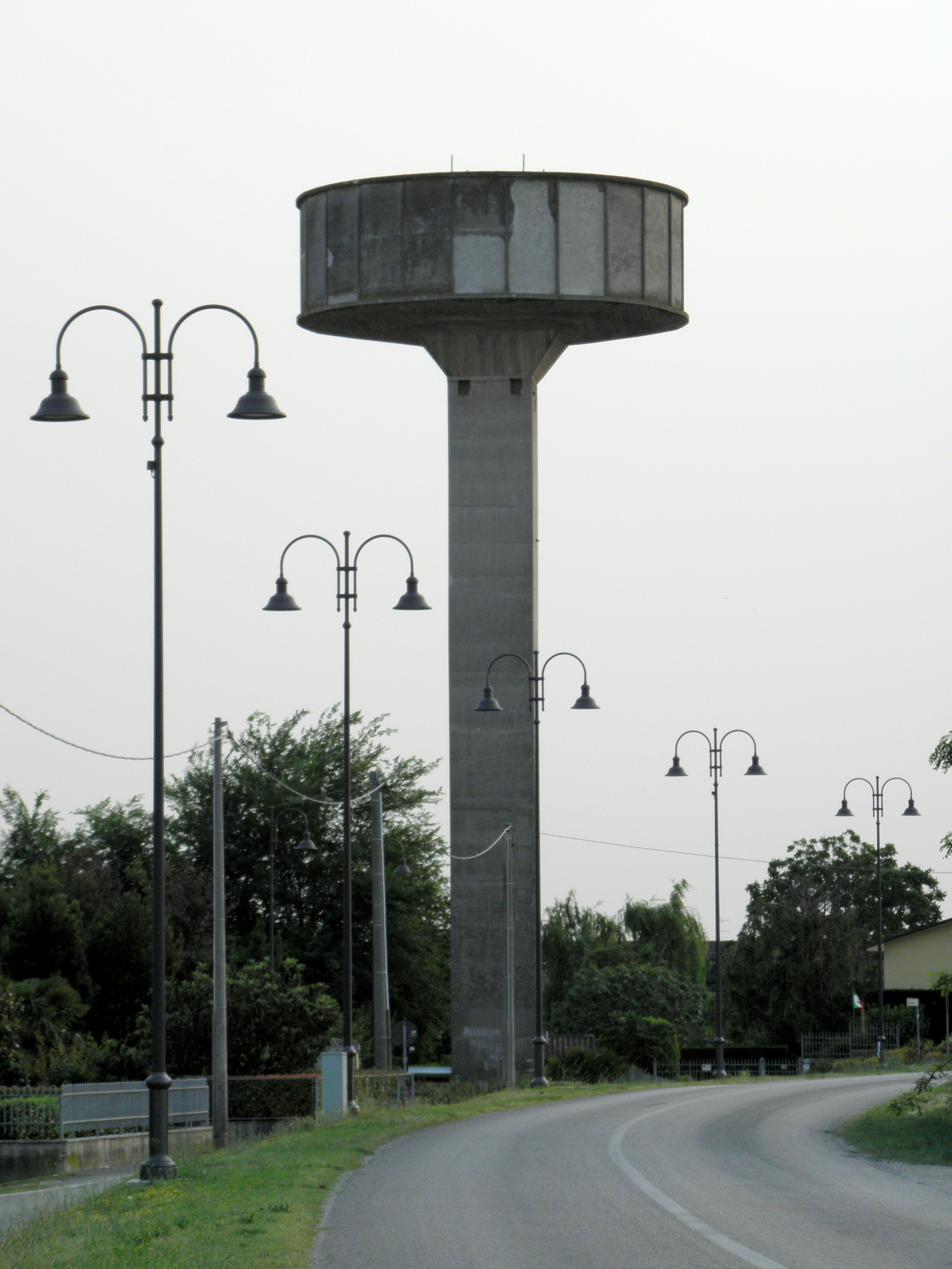 Bosaro: il torrino piezometrico.